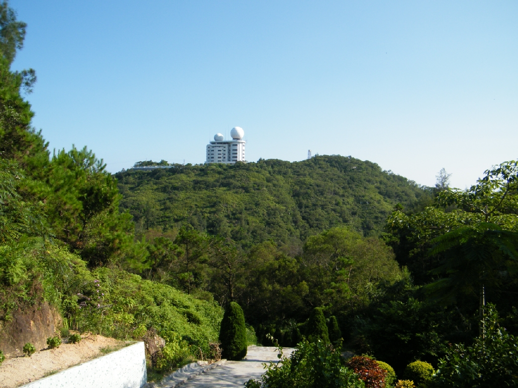 在云波亭看对面大瞭望山的气象台